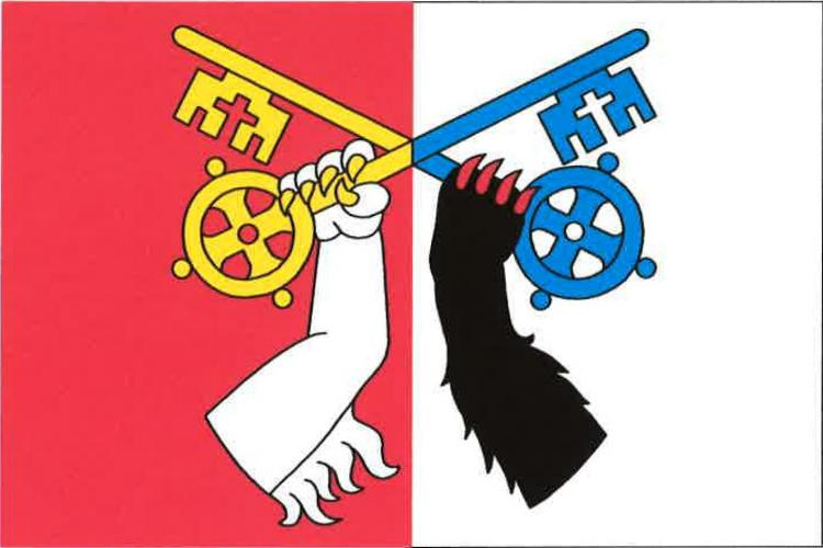 Trubín, vlajka. List tvoří dva svislé pruhy, červený a bílý. V horní části listu zkřížené klíče, v červeném pruhu žluté, v bílém modré. Klíče zdola držené tlapami odvráceně ohnutých nohou, v červeném pruhu bílou lví se žlutou zbrojí, v bílém pruhu černou medvědí s červenou zbrojí. Poměr šířky k délce listu je 2 : 3.